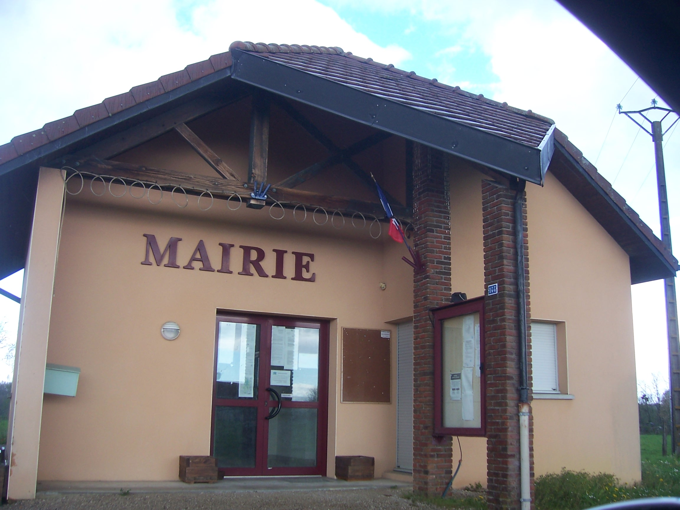 Mairie de La Chaux-en-Bresse